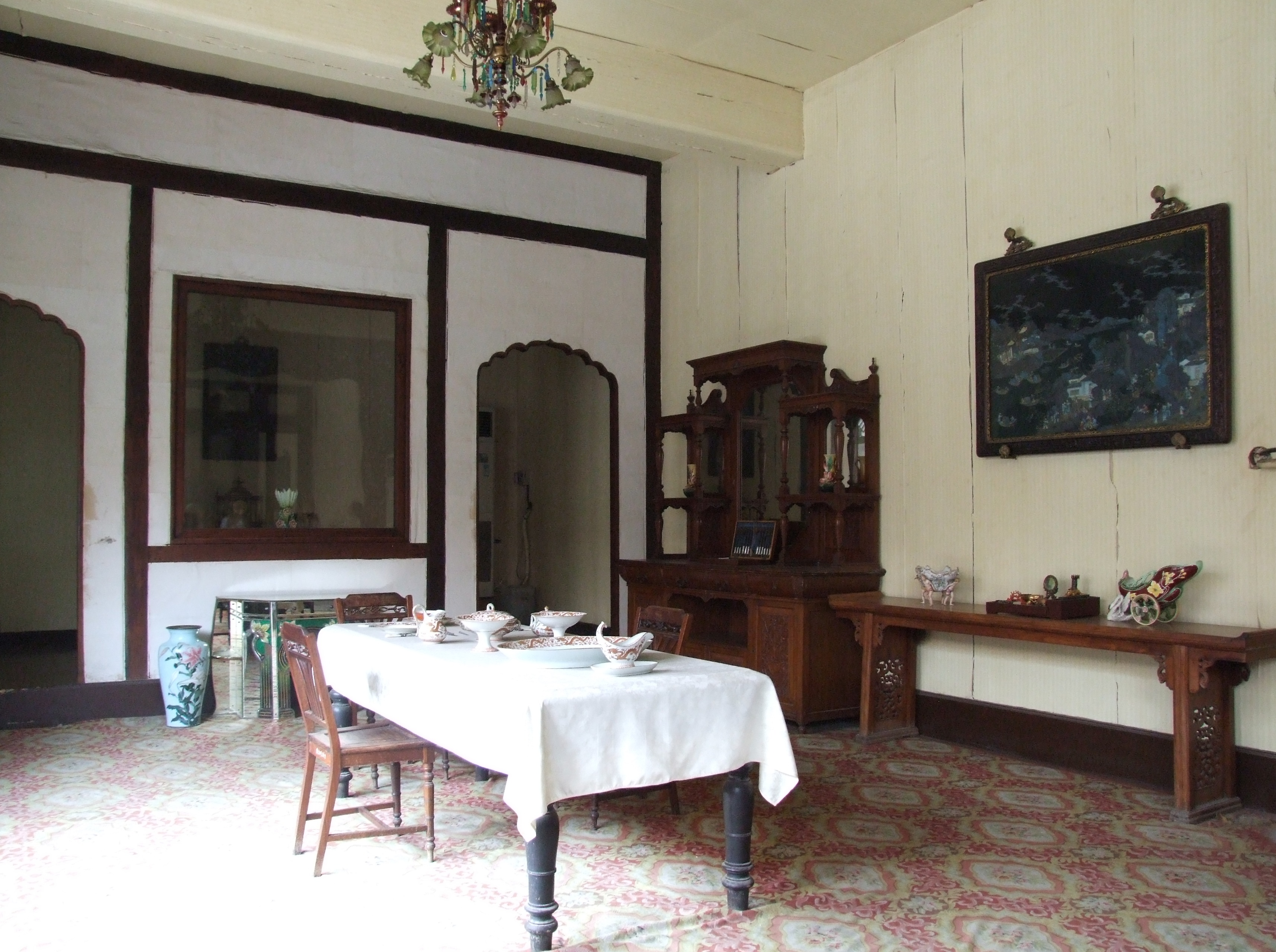 Verbotene Stadt